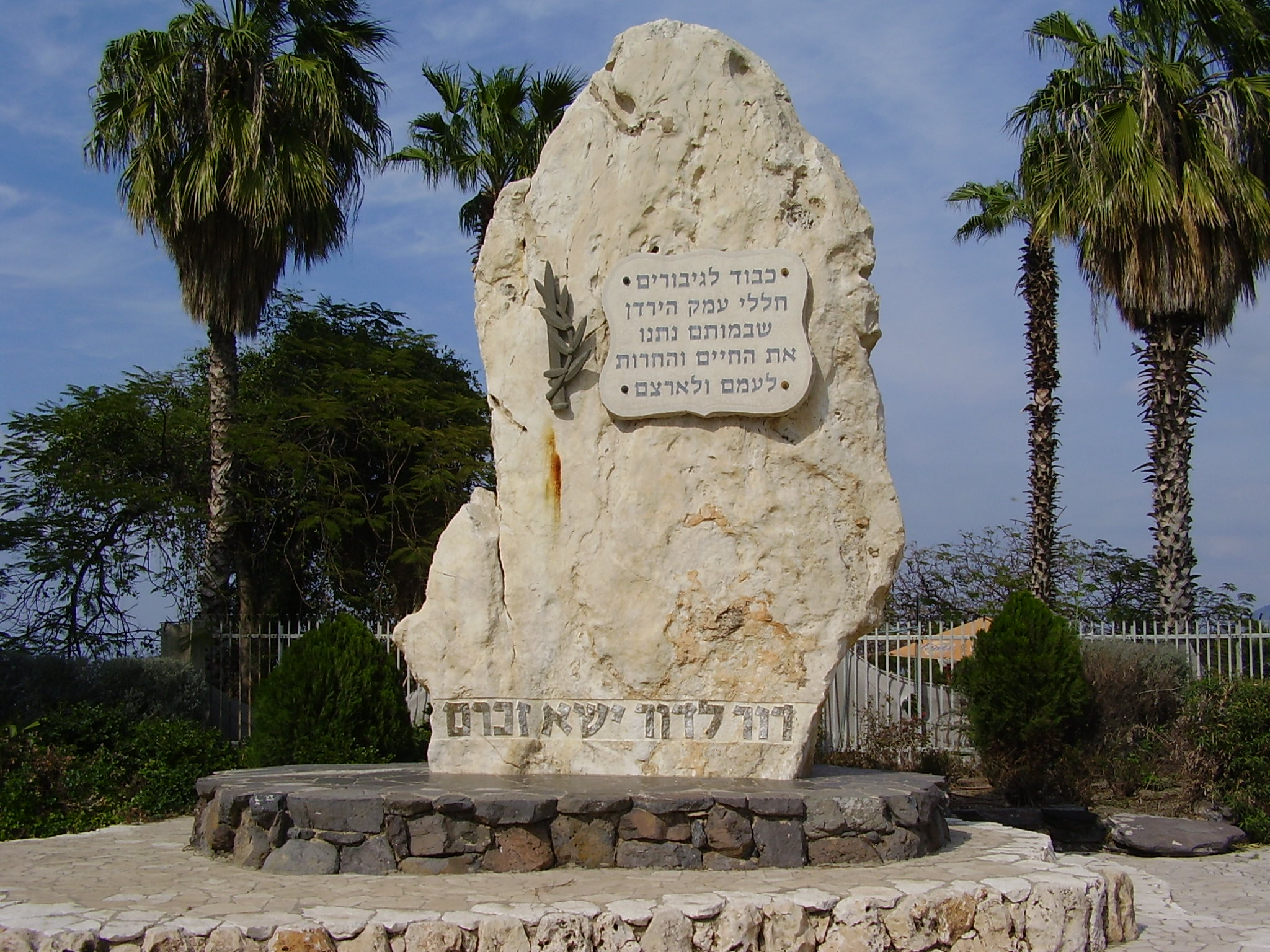 war memorial in samakh מצבת זכרון בצמח לתושבי עמק הירדן שנפלו במערכות ישראל